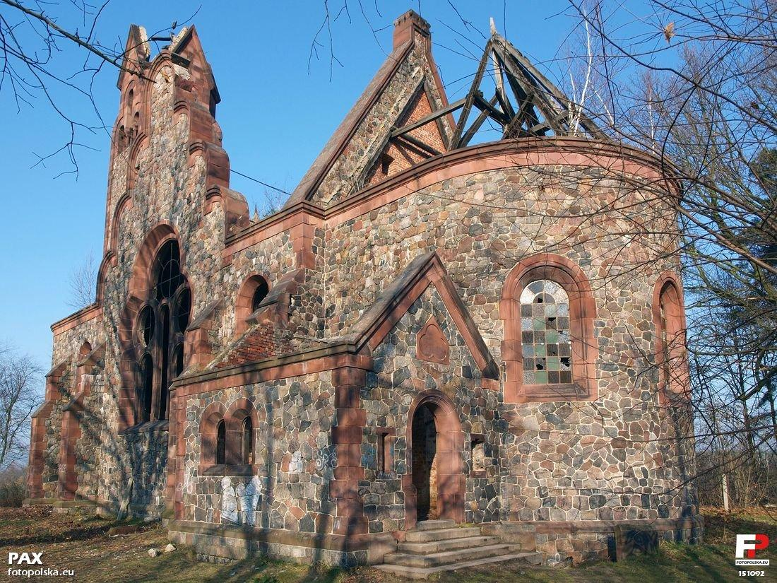 Ruina kościoła w Pisarzowicach.